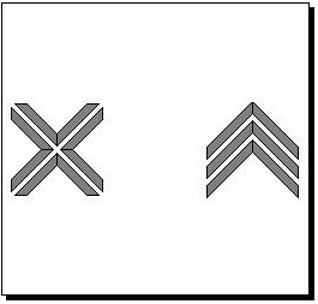 Beispielaufgabe des Testverfahrens zur räumlichen Orientierungsfähigkeit.